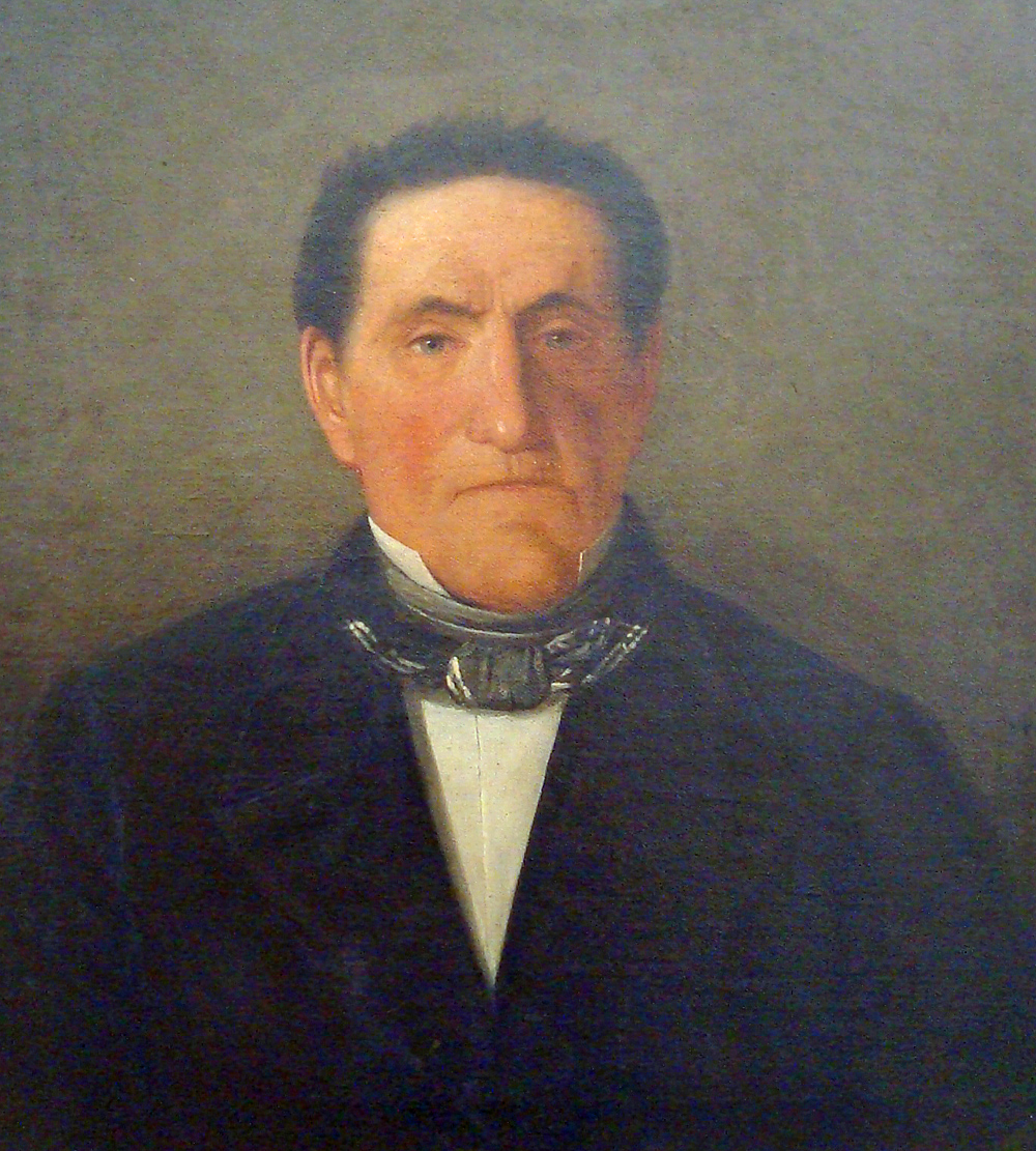 Heinrich Barth (* 1791 in Gütersloh), Garnhändler, Stadtverordneter, Stifter des Evangelischen Krankenhauses und des Rathauses in Gütersloh